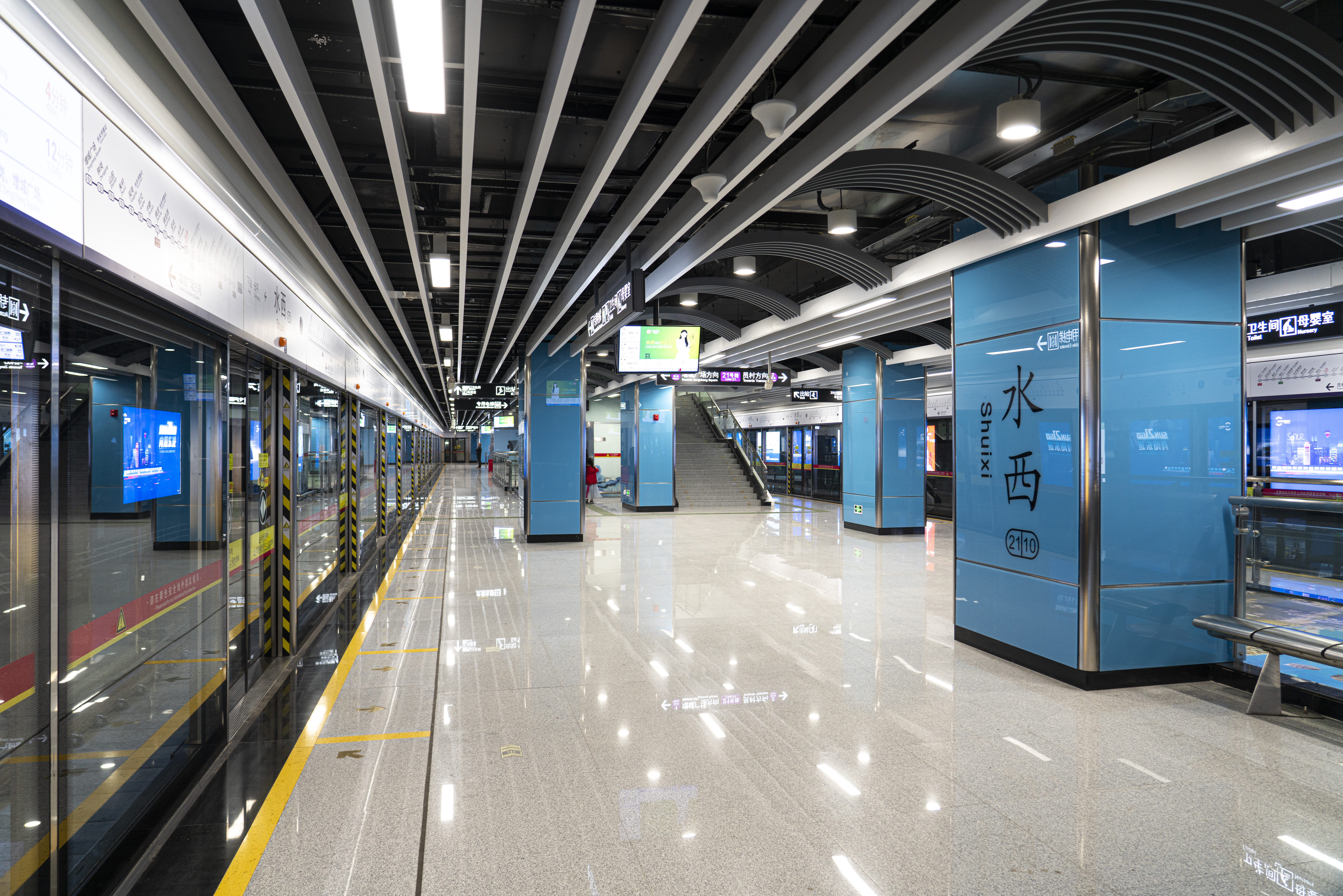 广州地铁水西站1号月台